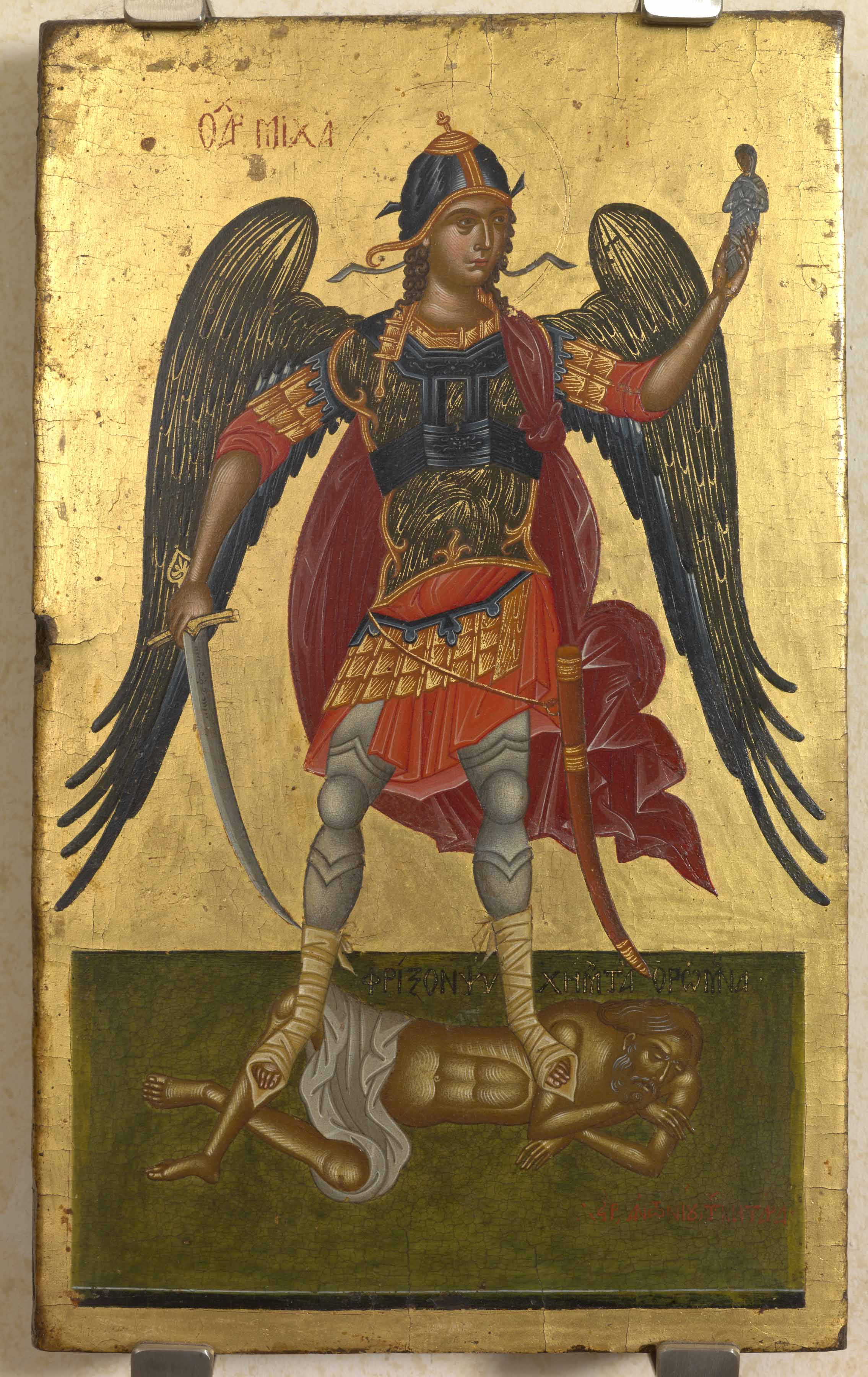 Ο αρχάγγελος Μιχαήλ 17ος αιώνας, 36x44,5εκ. Αντώνιος Μηταράς "Ο Α(ρ)Χ(άγγελος) ΜΙΧΑ(ήλ), ΧΕΙΡ ΑΝΤΩΝΙΟΥ ΤΟΥ ΜΗΤΑΡΑ" Στην εικόνα παριστάνεται ο αρχάγγελος Μιχαήλ σε ένα εικονογραφικό τύπο γνωστό στην μεταβυζαντινή ζωγραφική. Ο άγγελος φοράει στρατιωτική εξάρτυση, έχει γυμνό σπαθί στο δεξί χέρι, πατάει σε μισόγυμνο άντρα που βρίσκεται ξαπλωμένος στο έδαφος, και με το αριστερό του χέρι κρατάει την ψυχή του τελευταίου που έχει τη μορφή σπαργανωμένου βρέφους.